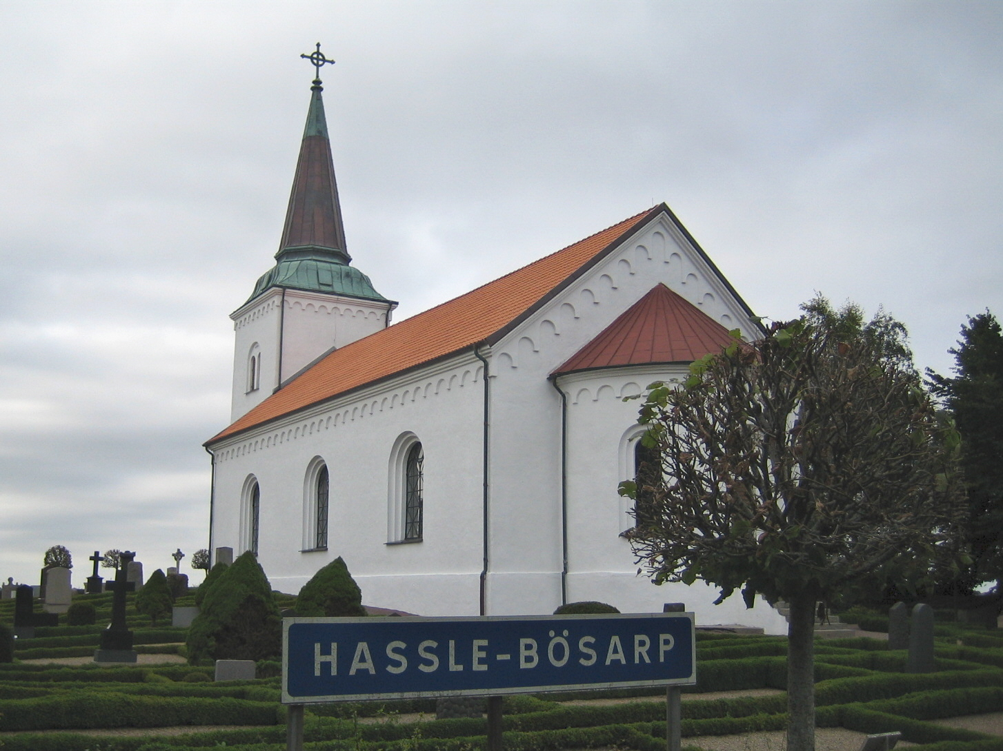 Hassle-Bösarps kyrka. Bilden tagen av mig själv 11 september 2005.